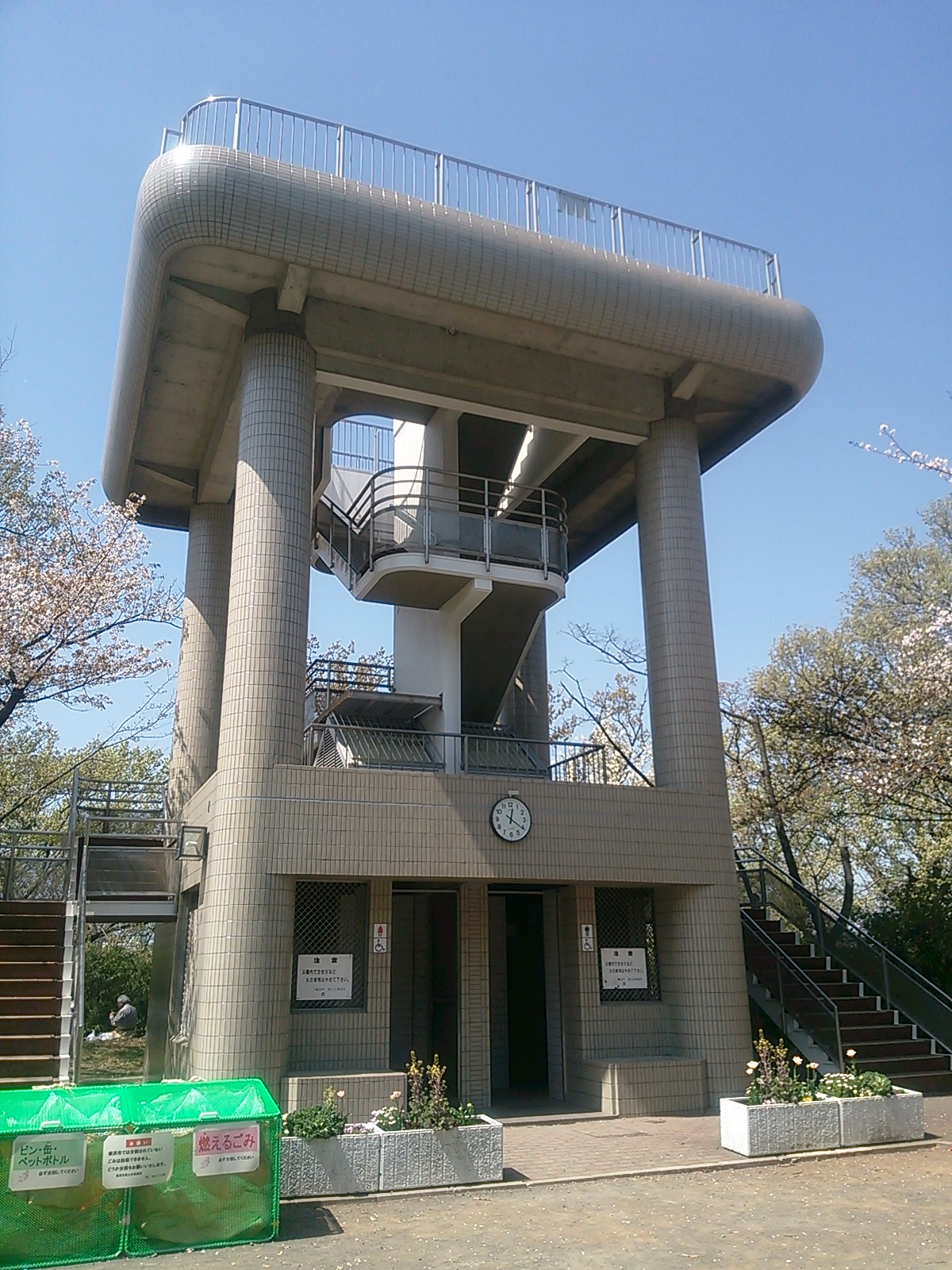 横浜市南区、弘明寺公園